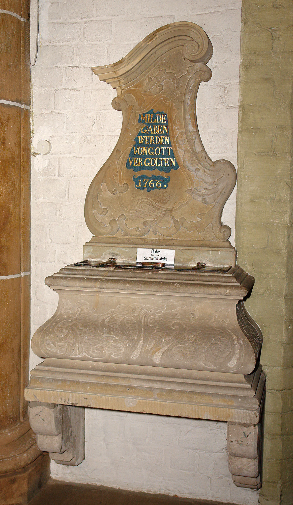 St.Martini-Kirche in Bremen. Opferstock von 1766